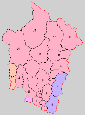 兵庫県宍粟郡の町村制時点の町村。